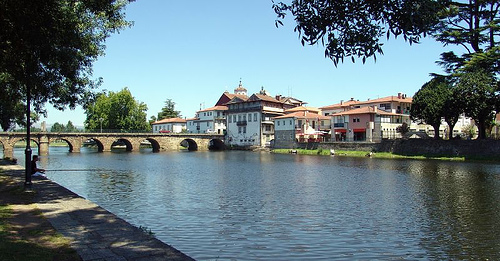 Chaves, a Ponte Romana e Rio Tâmega, a Madalena e Jardim Público. Fotografia de Carlos Botelho.